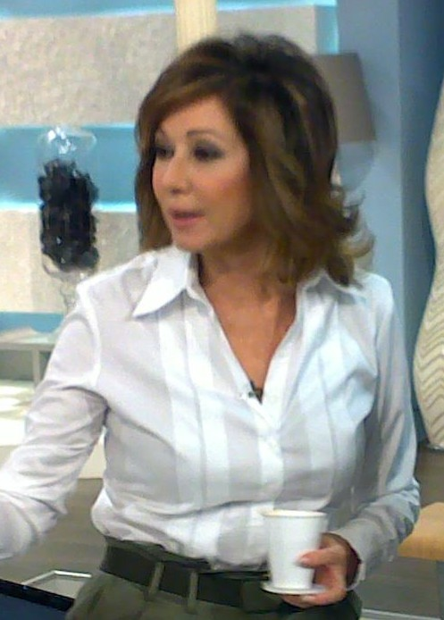 Ana Rosa Quintana (segunda por la izquierda) y Artur Mas (tercero)